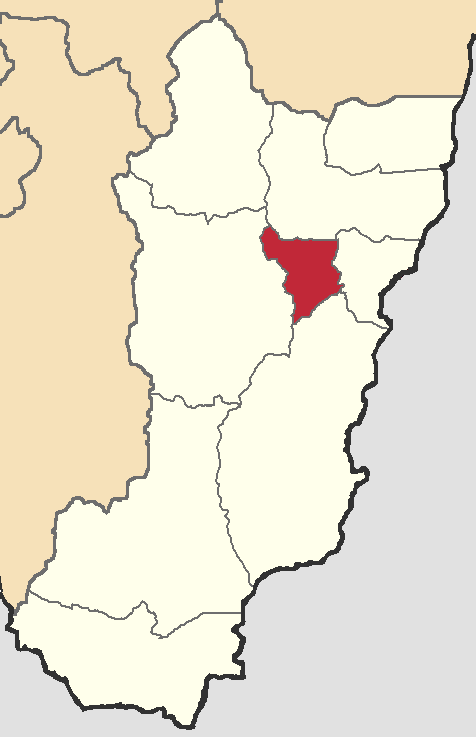 Mapa localizador del cantón en Zamora Chinchipe, Ecuador